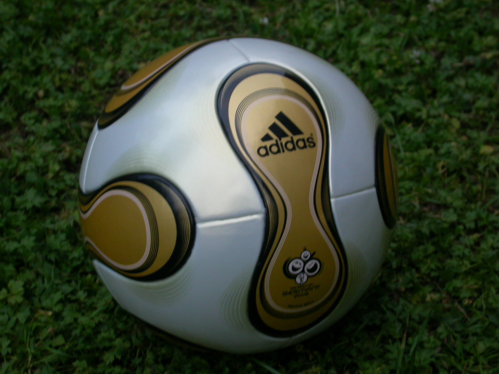 Foto eines Adidas +Teamgeist Berlin Fußballes der exklusiv für das Endspiel der Fußball-WM 2006 in Berlin gefertigt wird.